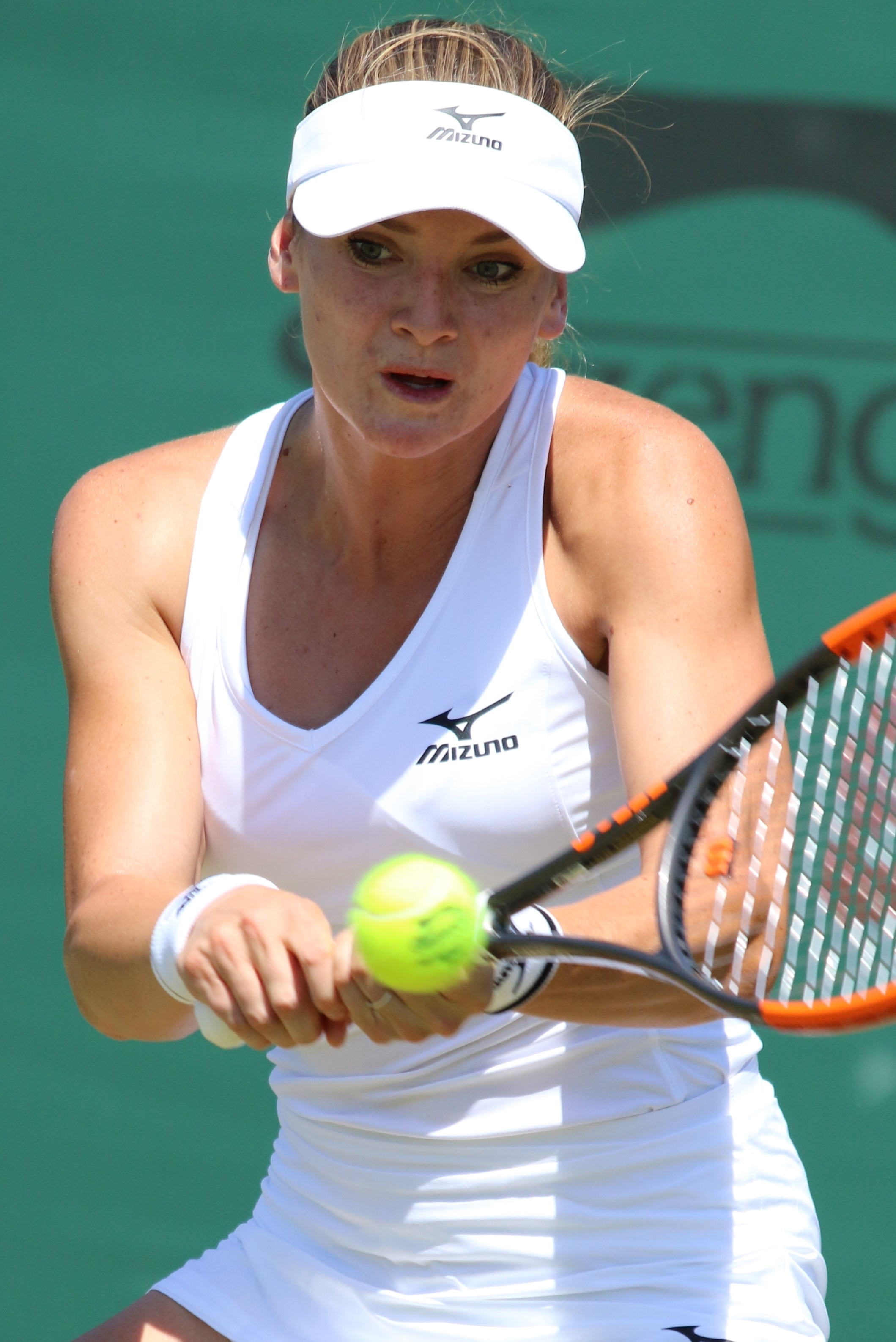 Martincova WMQ18 (9)